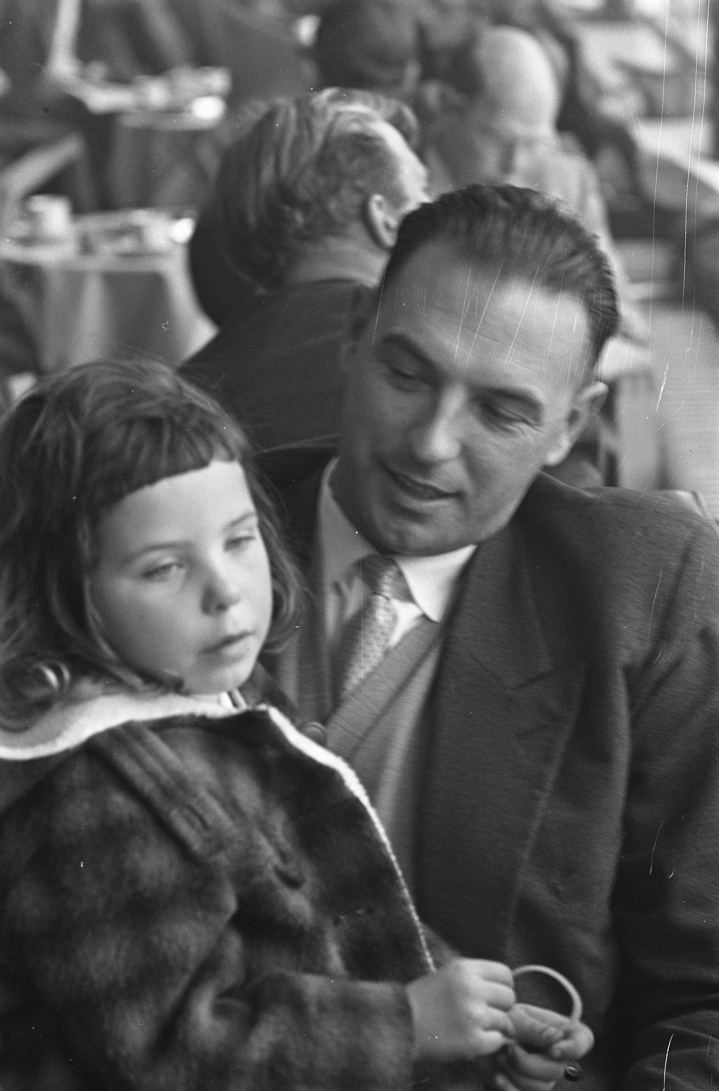 Collectie / Archief : Fotocollectie Anefo Reportage / Serie : [ onbekend ] Beschrijving : Vertrek van ir. G. E. van Dijk naar Moskou voor damwedstrijd Datum : 12 november 1959 Locatie : Moskou Trefwoorden : VERTREK, damwedstrijden Persoonsnaam : ir. G. E. van Dijk Fotograaf : Pot, Harry / Anefo Auteursrechthebbende : Nationaal Archief Materiaalsoort : Negatief (zwart/wit) Nummer archiefinventaris : bekijk toegang 2.24.01.05 Bestanddeelnummer : 910-8166